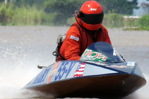 Regata Guayaquil- Vinces 2012. Jeff Yungen en plena competencia.